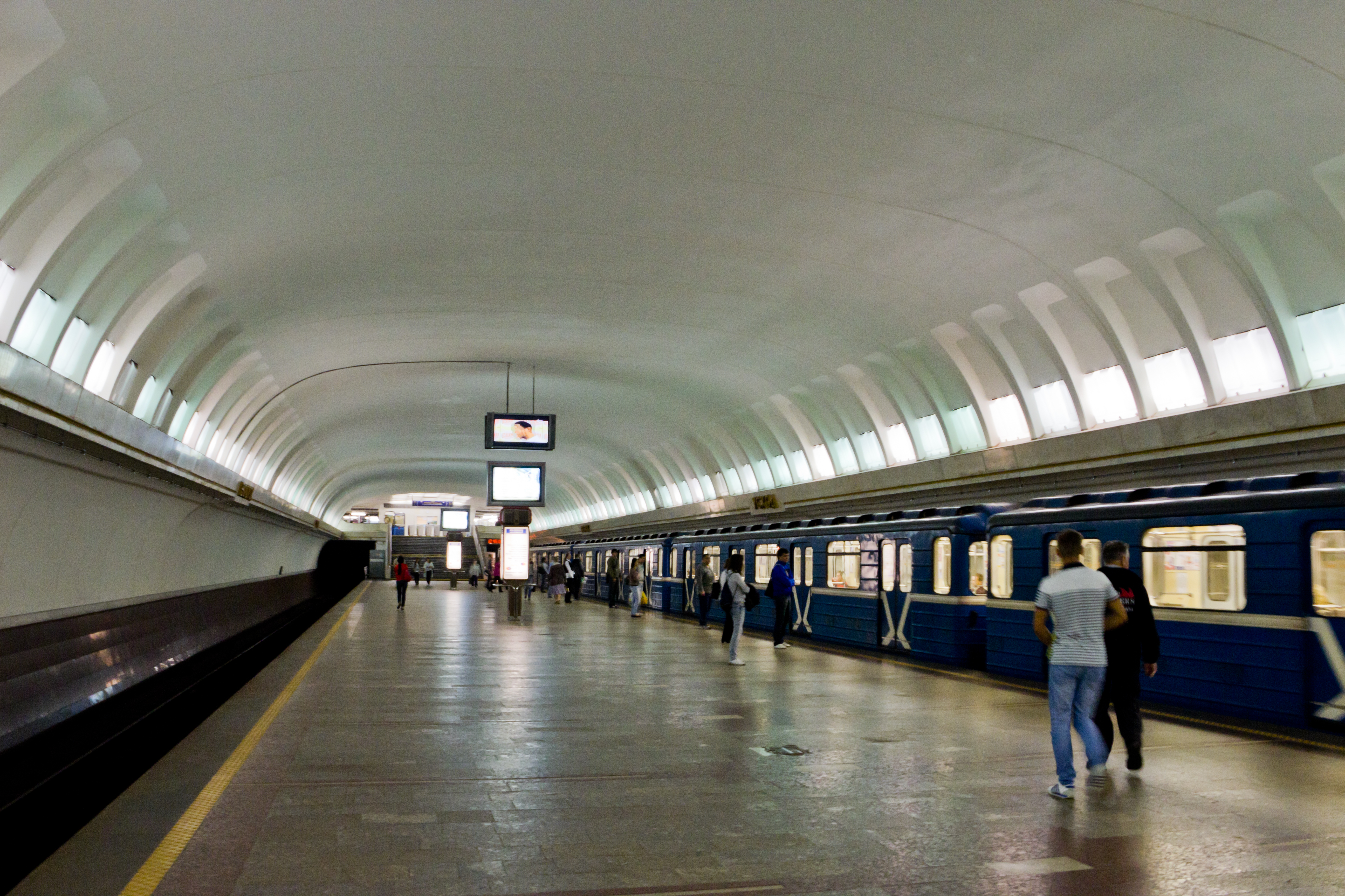 Станция метро «Восток», Минск